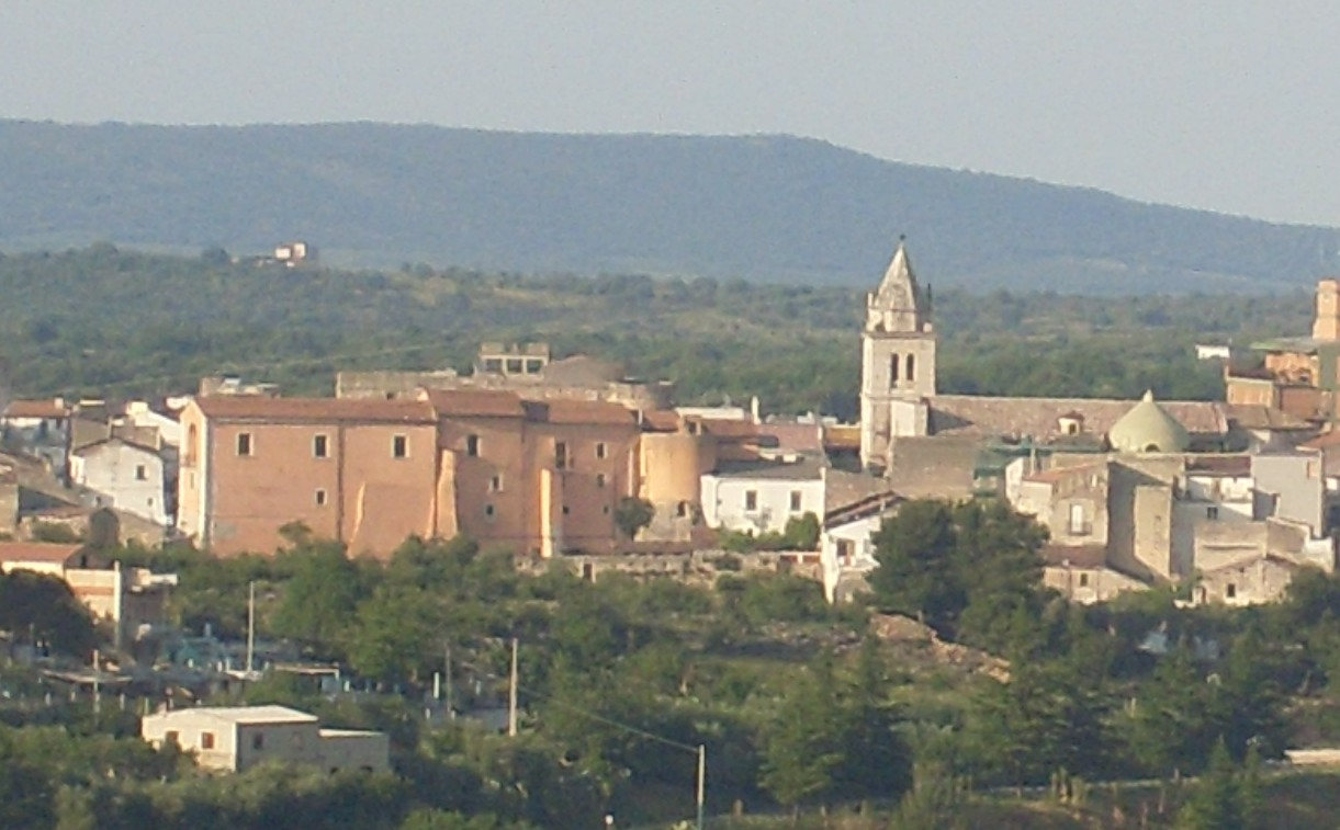 Palazzo Fioritto (a sinistra) e Chiesa di Santa Maria del Borgo (a destra)